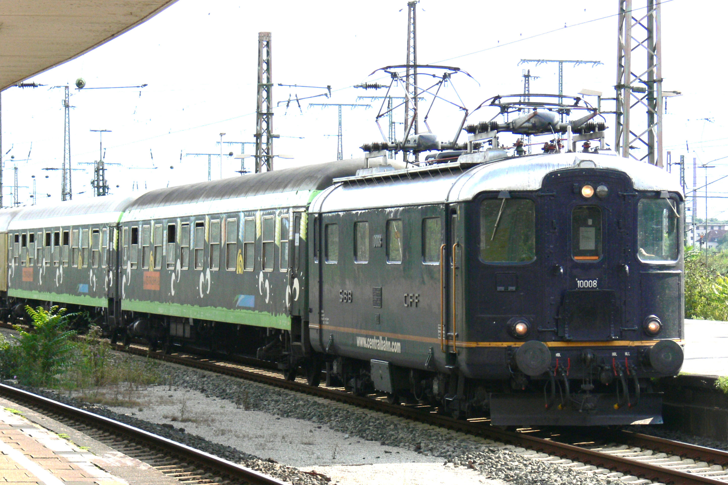 Lok 10008 der Centralbahn AG ex SBB Re 4/4 I im Hauptbahnhof Duisburg